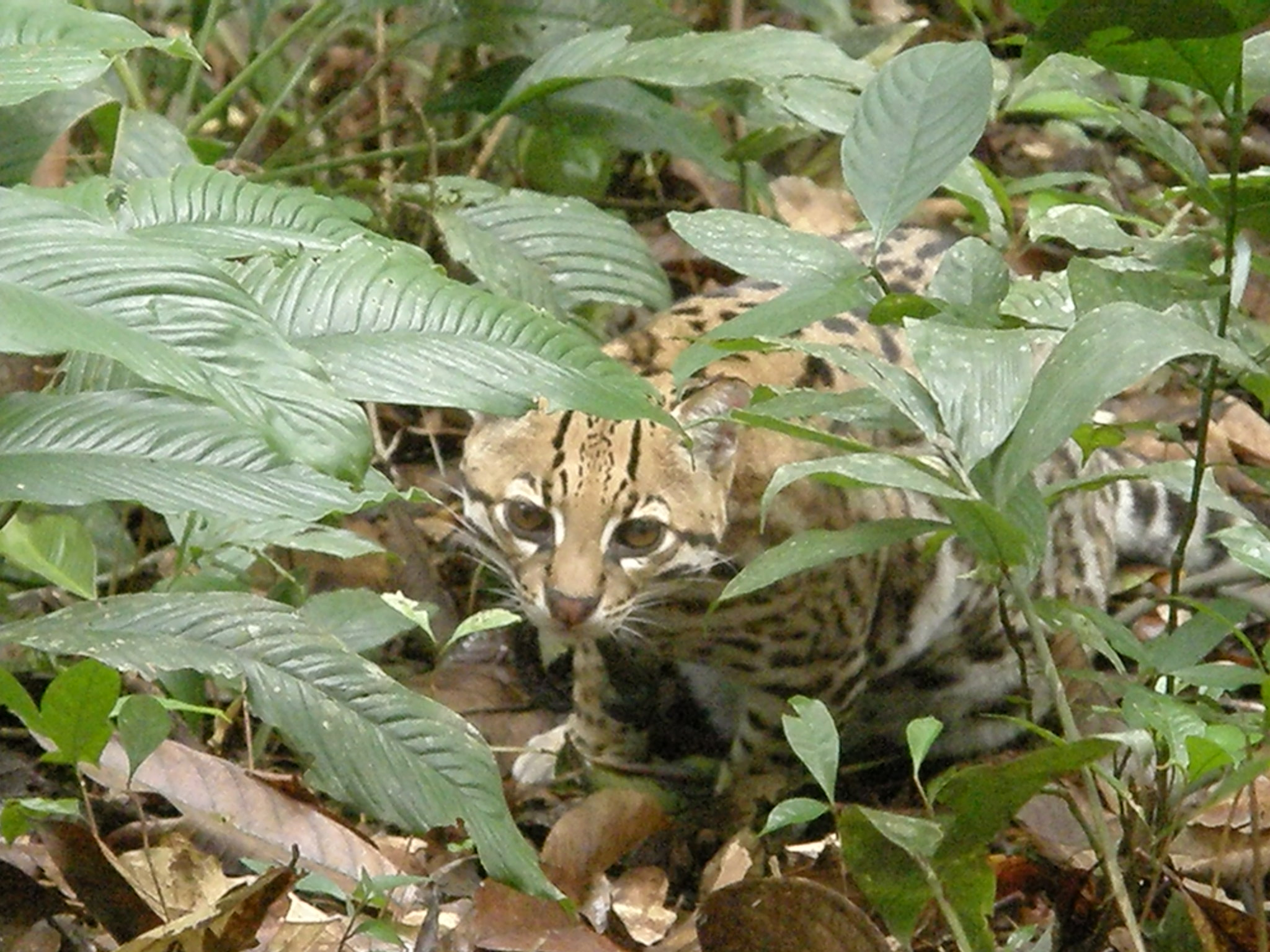 אוצלוט בג'ונגל בבוליביה